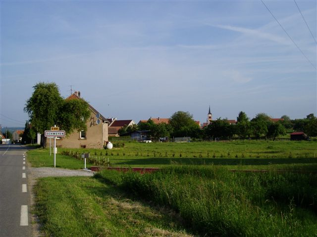 schweyen